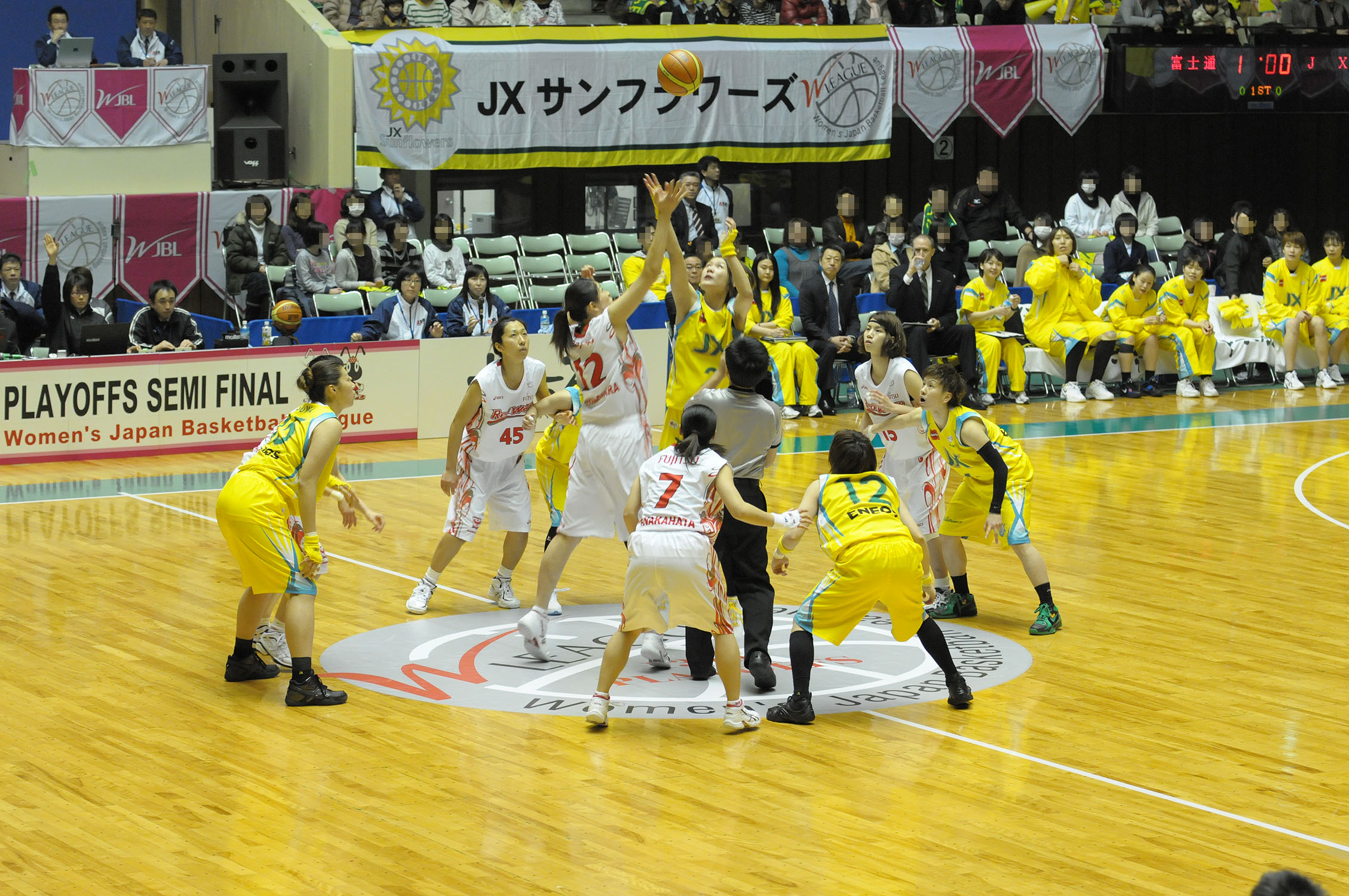 WJBL 11-12プレーオフセミファイナル、富士通対JX。秋田県立体育館で。